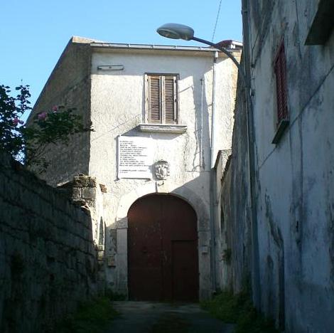 Casa di famiglia di Matilde Serao, ove soggiornò nell'infanzia